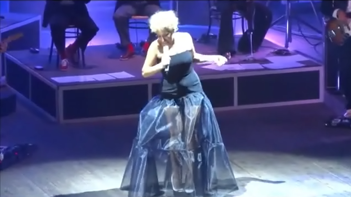 Screenshot di video amatoriale da me filmato il 3 Novembre 2012 raffigurante Malika Ayane che canta dal vivo Feeling Better durante il Ricreazione Tour. Per il filmato è stata usata una coolpix s30.